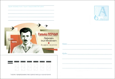 Гальяш Леўчык на паштовай картцы Беларусі